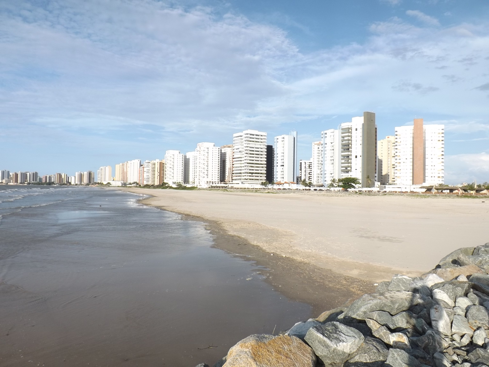 Fotografia tirada na Praia da Ponta D'areia localizada no Parque estadual da Lagoa da Jansen.